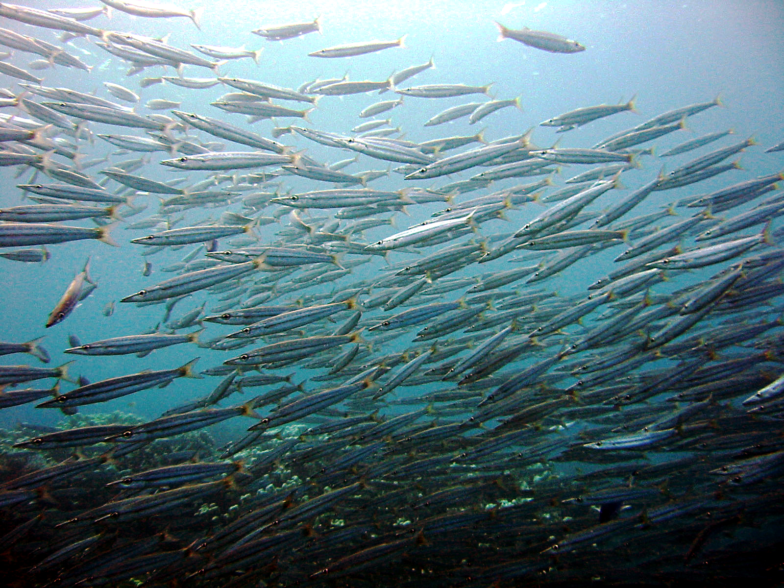 Yellowtail barracuda Taba Egypt